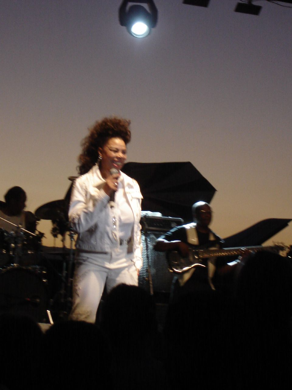 millie jackson @ sunset junction